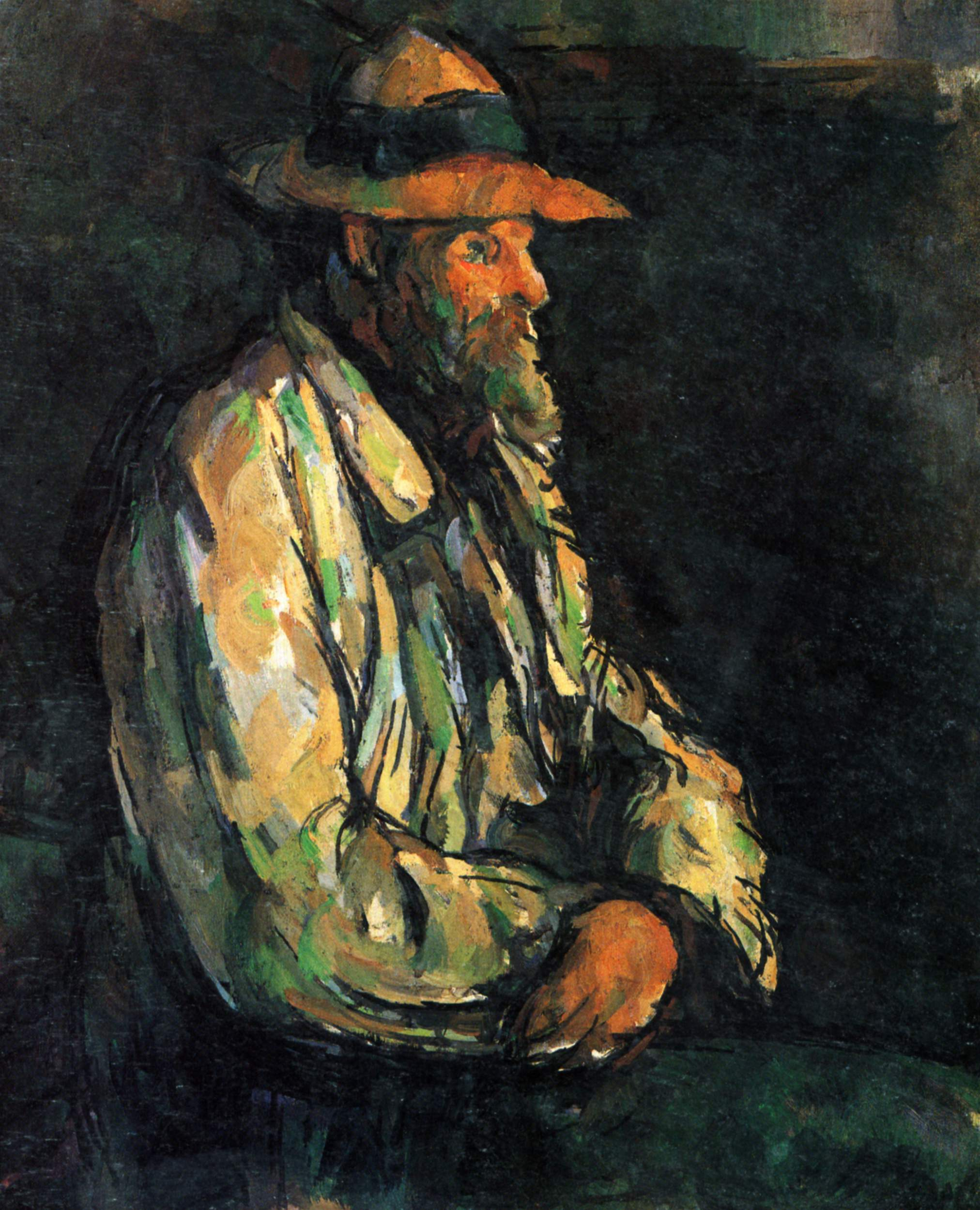 Porträt des Vallier